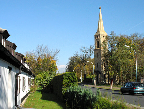 Gesindehaus, Dorfstraße und Kirche in Pinnow im Landkreis Oberhavel im Land Brandenburg